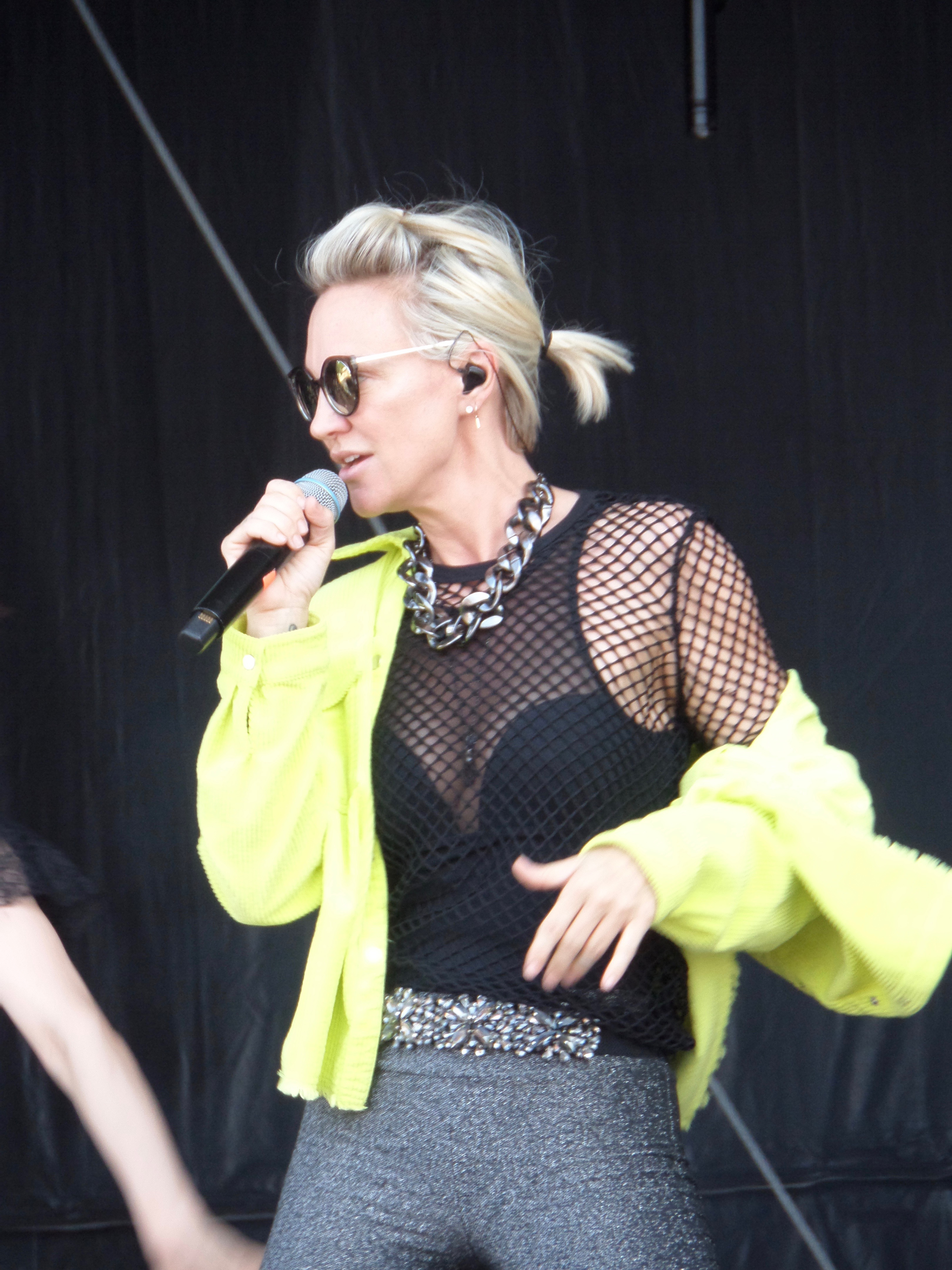 Kate Ryan bei 90er Live in Vechta